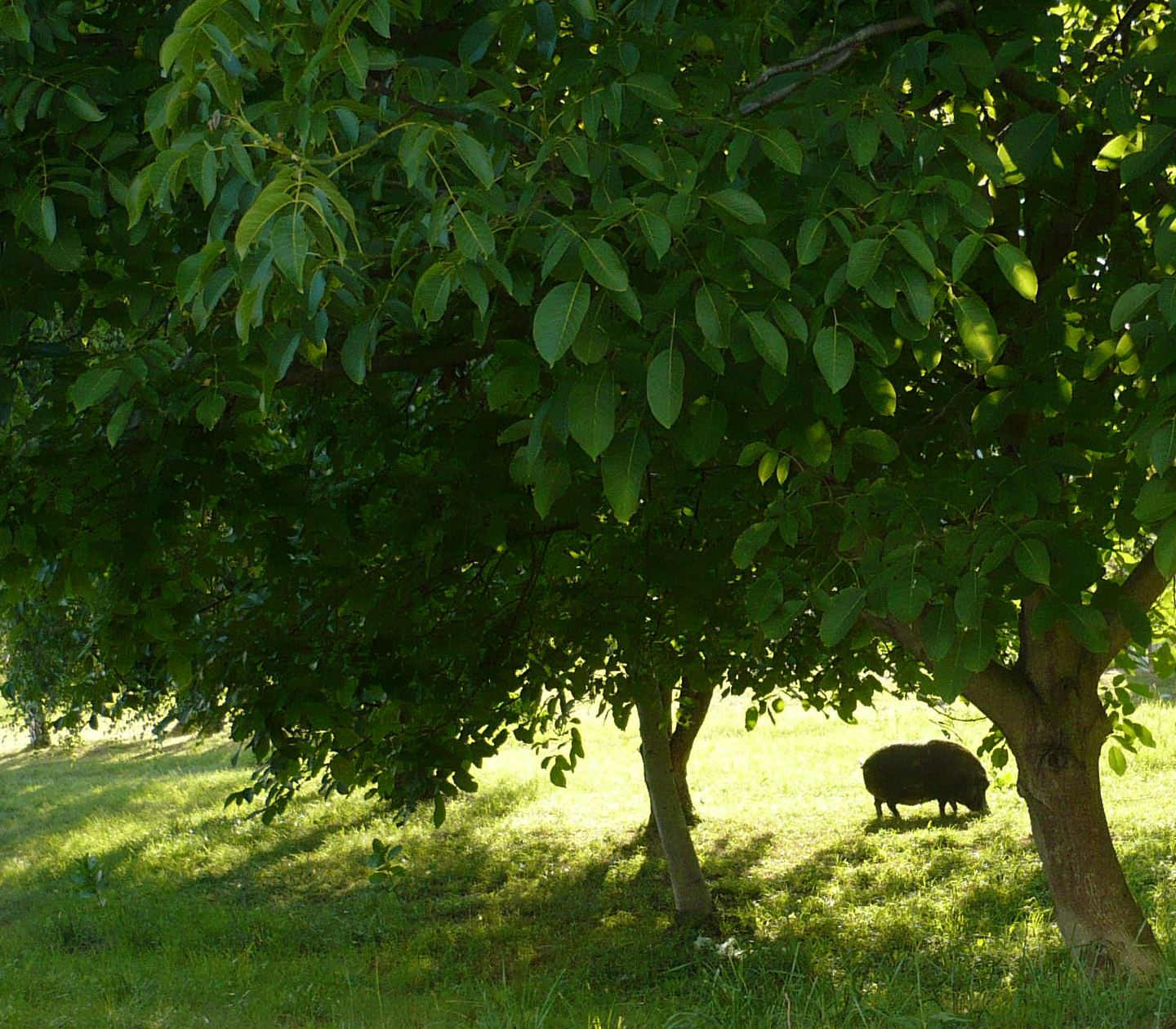 Vaddisznó Karapancsánál (Szerbia)